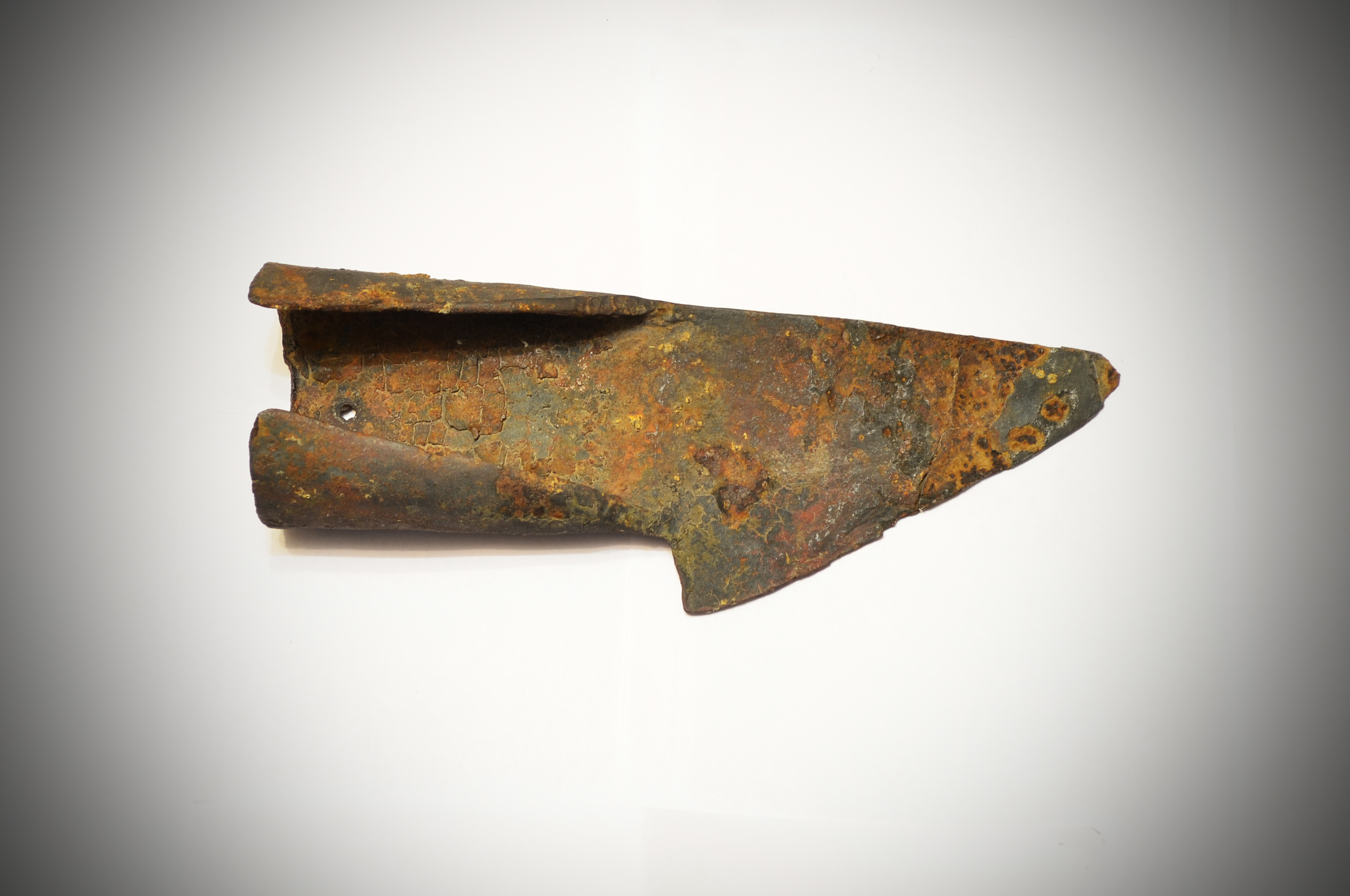 Сошник (лемех) из Рязанской губернии,Россия.